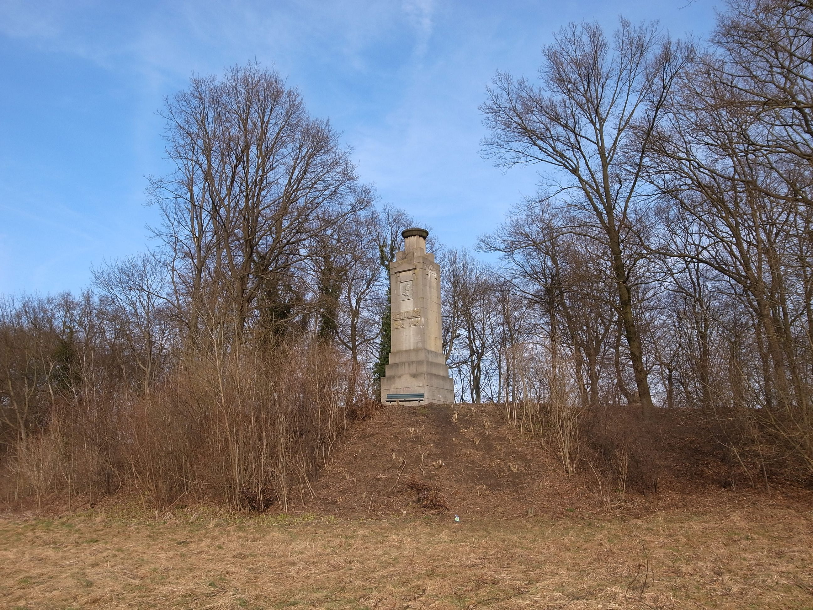 Dessau-Roßlau, Schillerpark mit Schillerturm ehemals Bismarckturm (Der Schillerpark ist ein Baudenkmal im Denkmalverzeichniss Sachsen-Anhalt, Erfassungsnummer: 094 40124 000 000 000 000 [1])